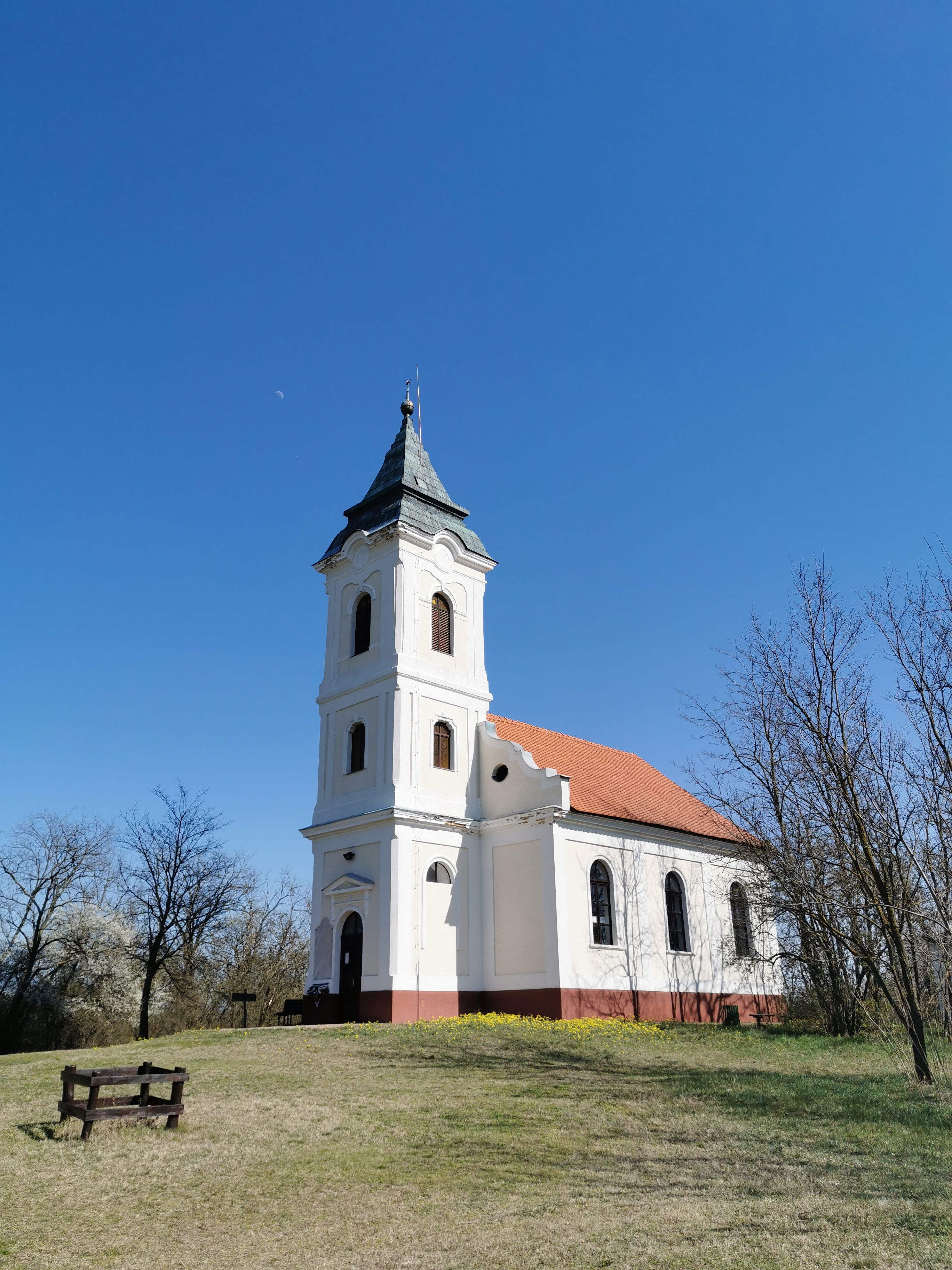 Kunpuszta - Kunkerekegyháza református temploma